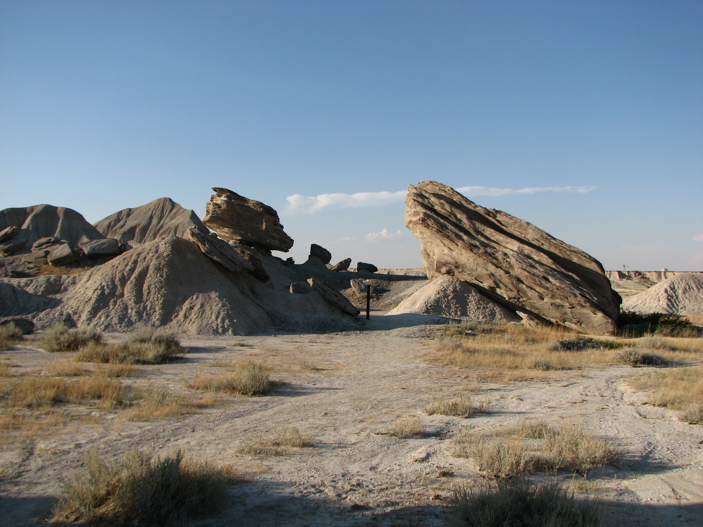 Toadstool Geologic Park, Nebraska Badlands. Kahvc7